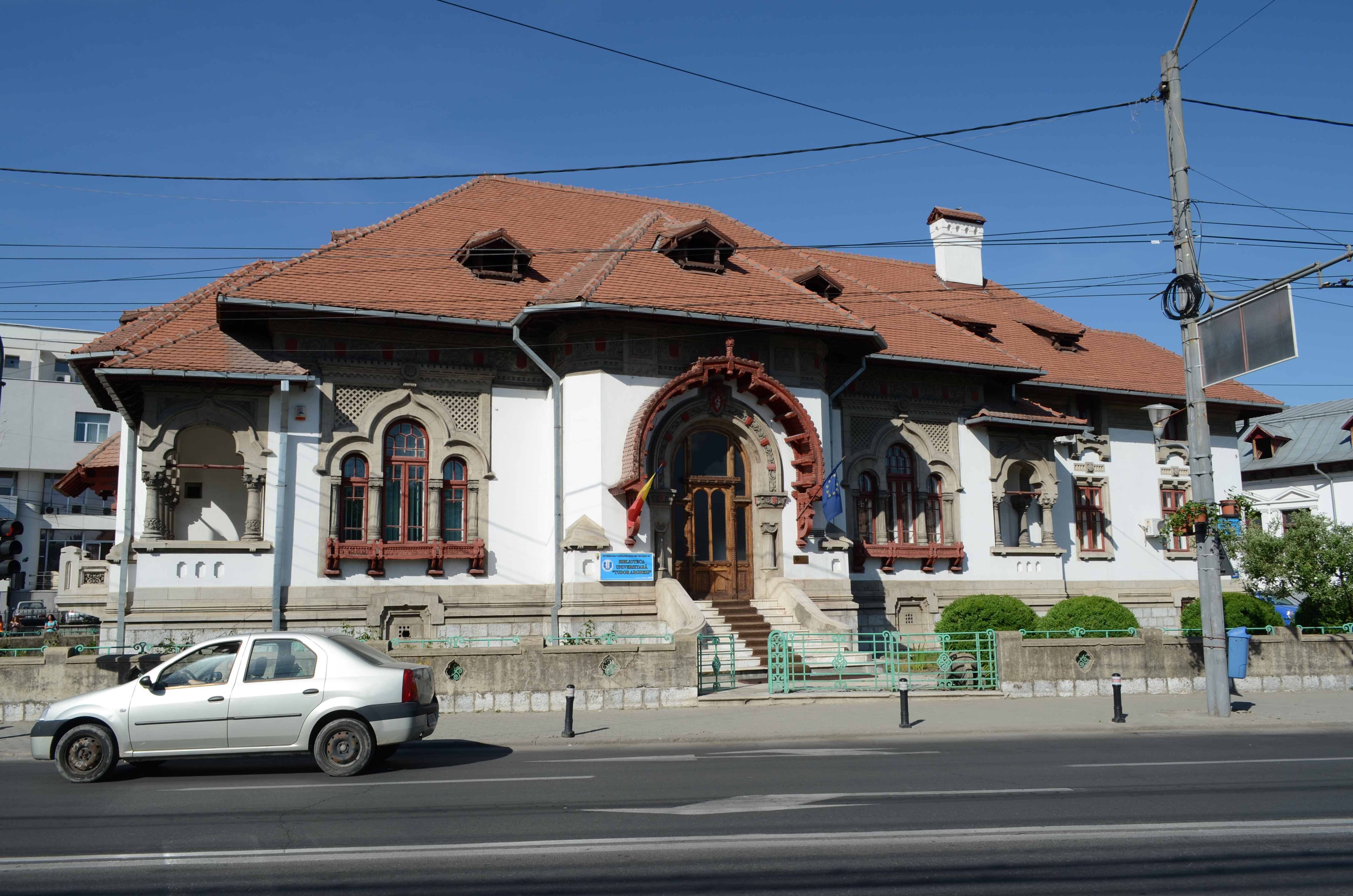 Biblioteca "Tudor Arghezi" (Casa Iunian Grigore), Bd. Republicii nr. 1, Târgu Jiu